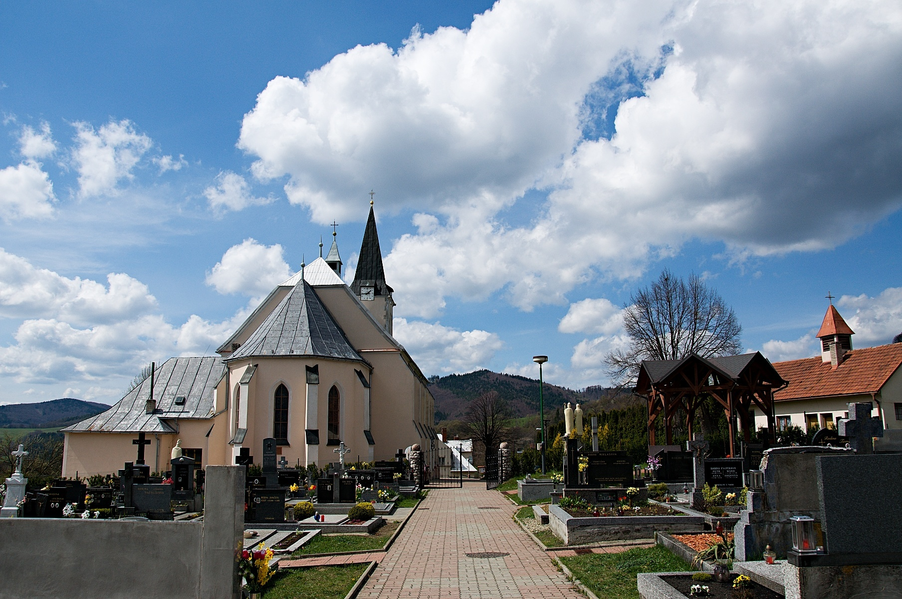 Nedašov, okr. Zlín